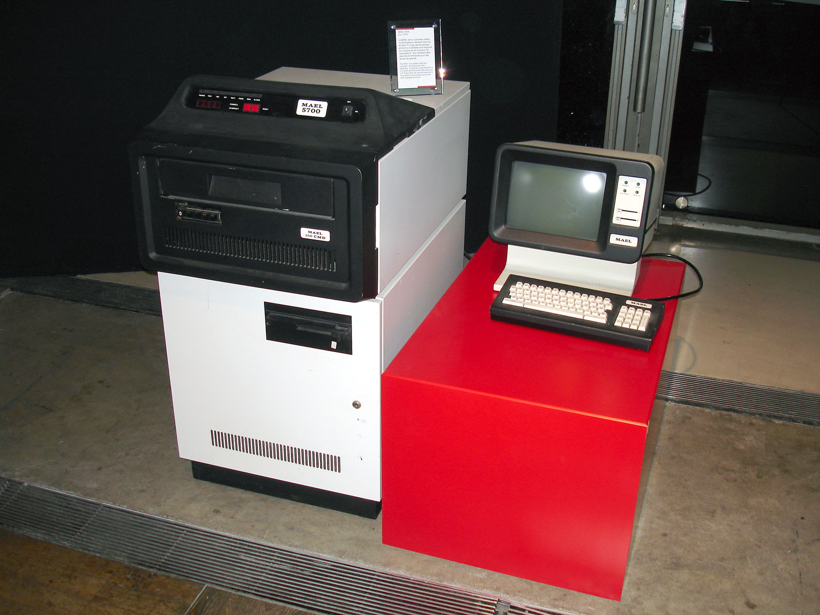 Musée de l'Informatique à La Défense, Hauts-de-Seine, France. Le MAEL 5700 est un ordinateur italien multi-utilisateurs des années 1970. Il dispose d'un disque dur, et d'un lecteur de disquettes 8 pouces.